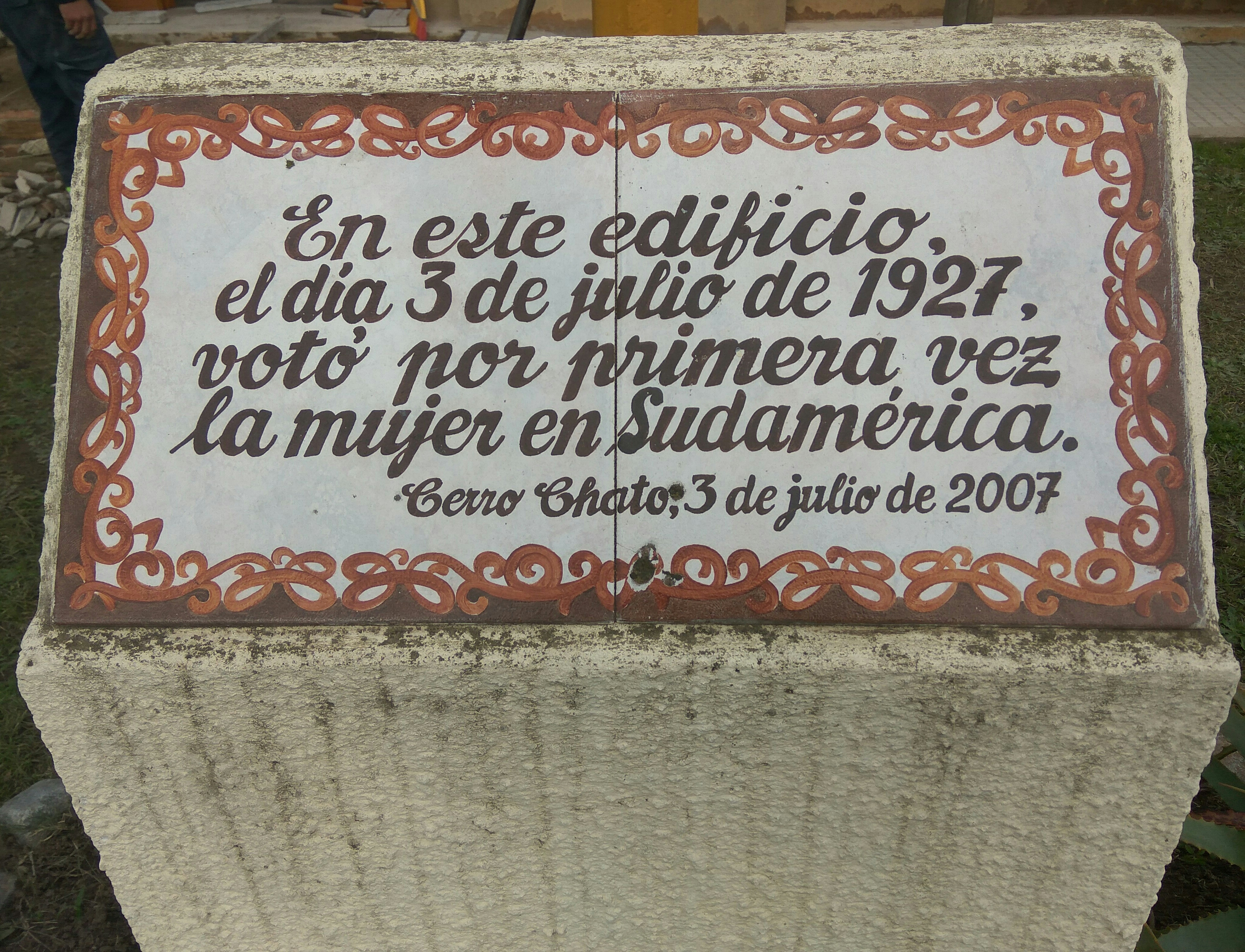 Placa conmemorativa frente al edificio de la localidad de Cerro Chato (Uruguay) donde, el 3 de julio de 1927, votó por primera vez una mujer en Sudamérica. Ubicada en la esquina de las calles Julio Alberto Goday y Soubiron Calo, en Cerro Chato.